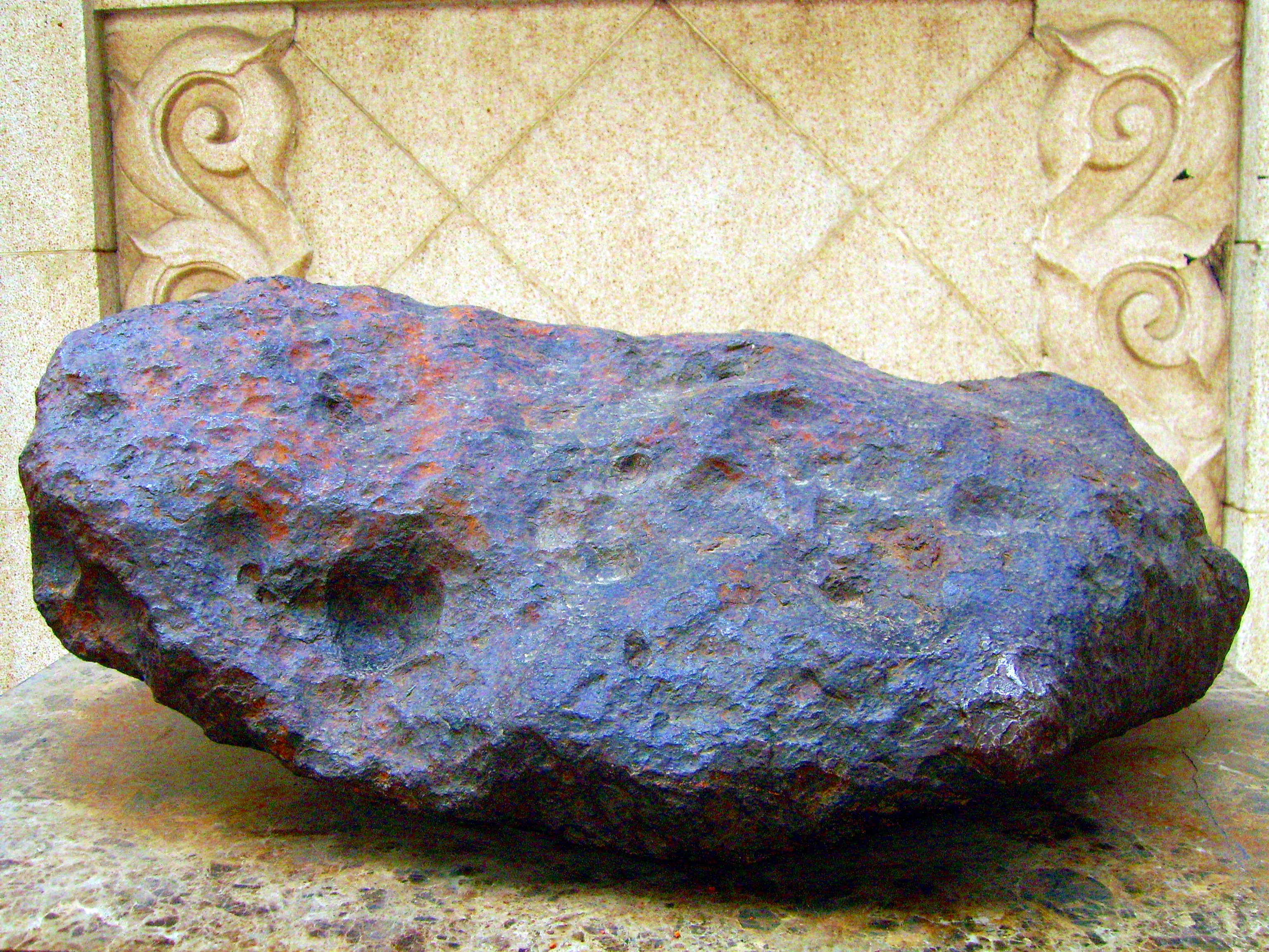 南丹铁陨石.1516年的陨石雨,陨落于广西南丹县里湖乡甲木村西南山坡,1958年发现.重680kg。为粗粒八面体铁陨石（Fe91%; Ni7%）,1992年8月放在北京天文馆